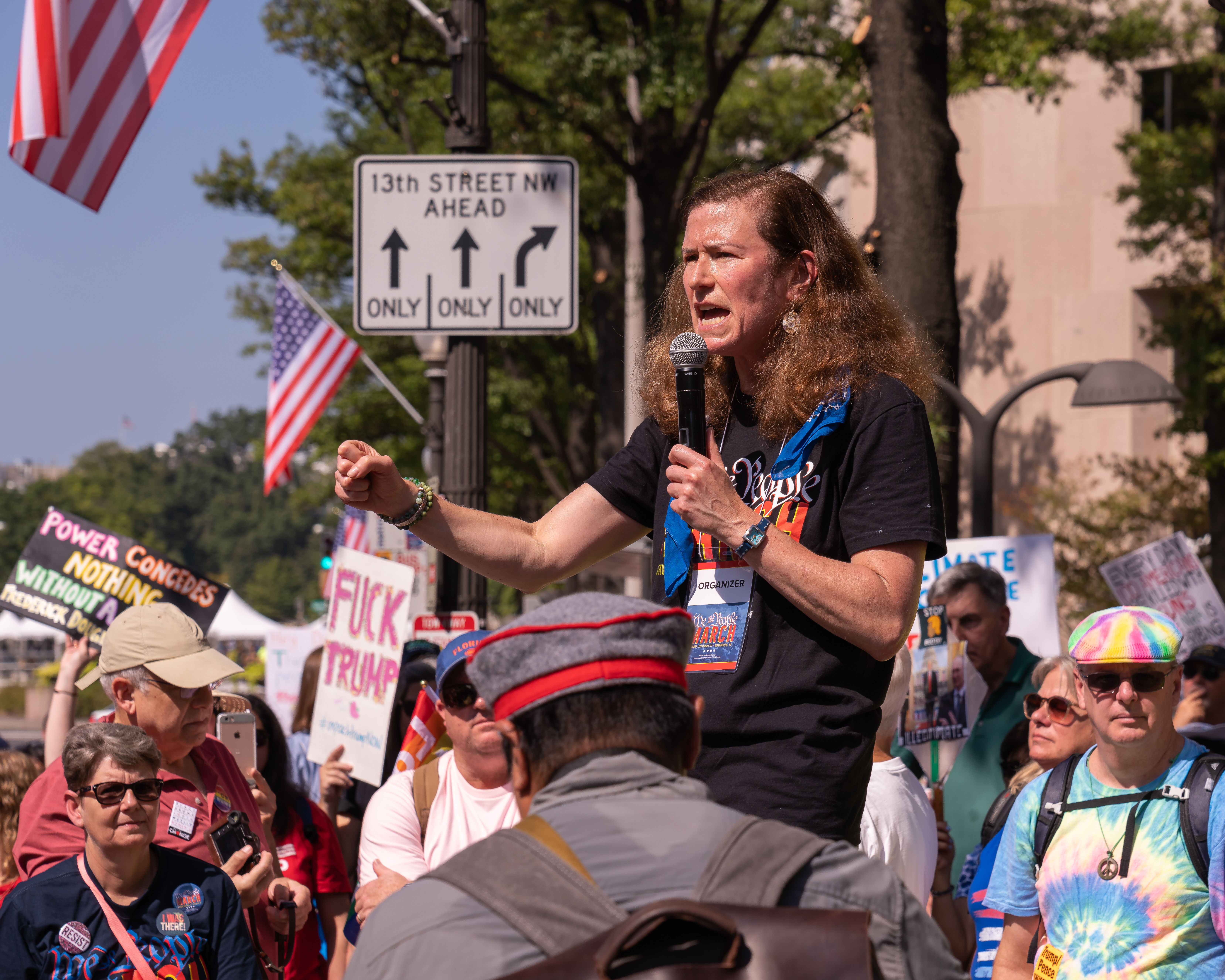 Amy Siskind